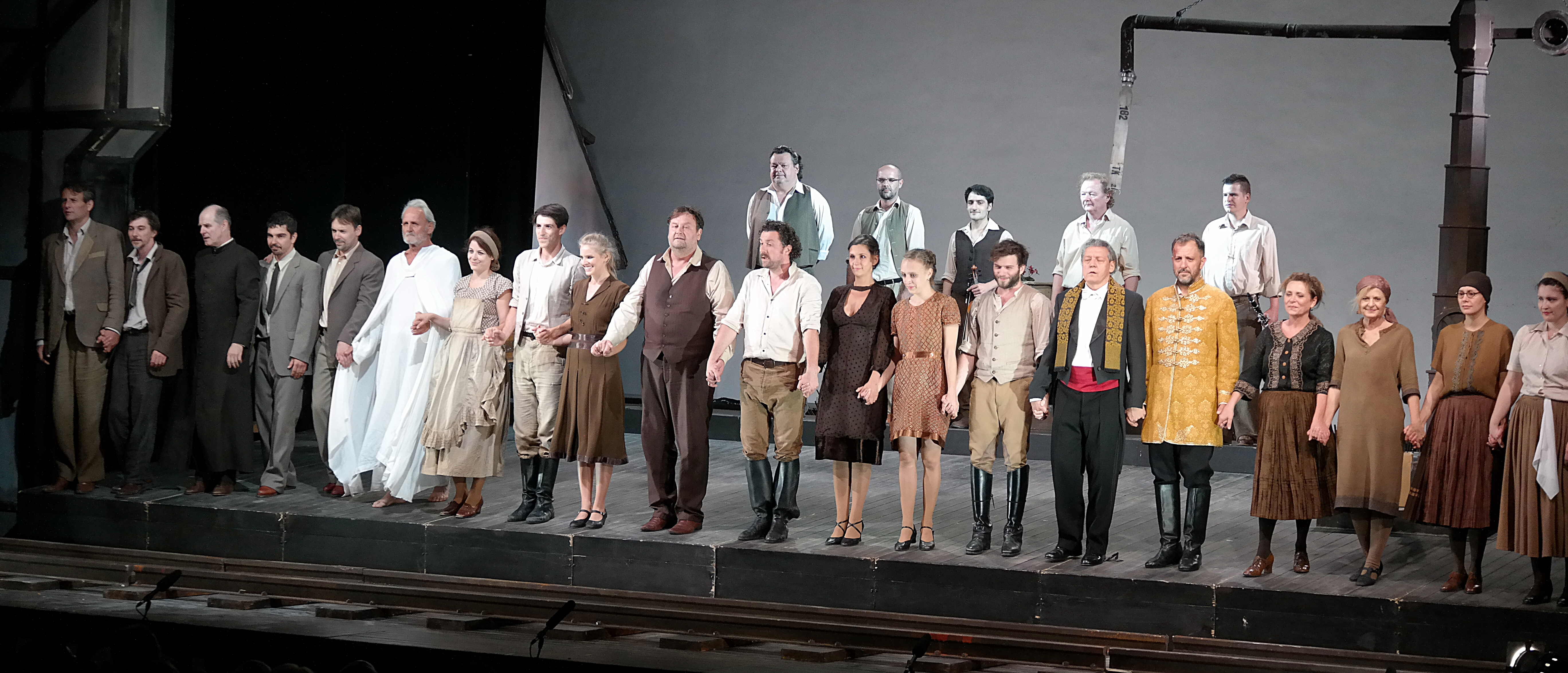 A falu rossza tapsrend Szombathelyi Weöres Sándor Színház. Balról-jobbra. Hátsó sor a zenészek: Horváth Ferenc, Kiss Krisztián, Horváth Dániel, Peltzer Géza, Hotzi Péter. Alsó sor: Horváth Ákos, Kálmánchelyi Zoltán, Mertz Tibor, Szabó Róbert Endre, Móri Csaba, Trokán Péter, Alberti Zsófia, Matusek Attila, Edvi Henrietta, Bajomi Nagy György, Bányai Kelemen Barna, Bánfalvi Eszter, Sodró Eliza, Kenderes Csaba, Szerémi Zoltán, Endrődy Krisztián, Németh Judit, Vlahovics Edit, Nagy Cili, Papp-Ionescu Dóra